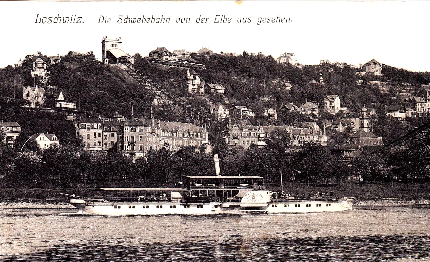 Dampfschiff König Albert